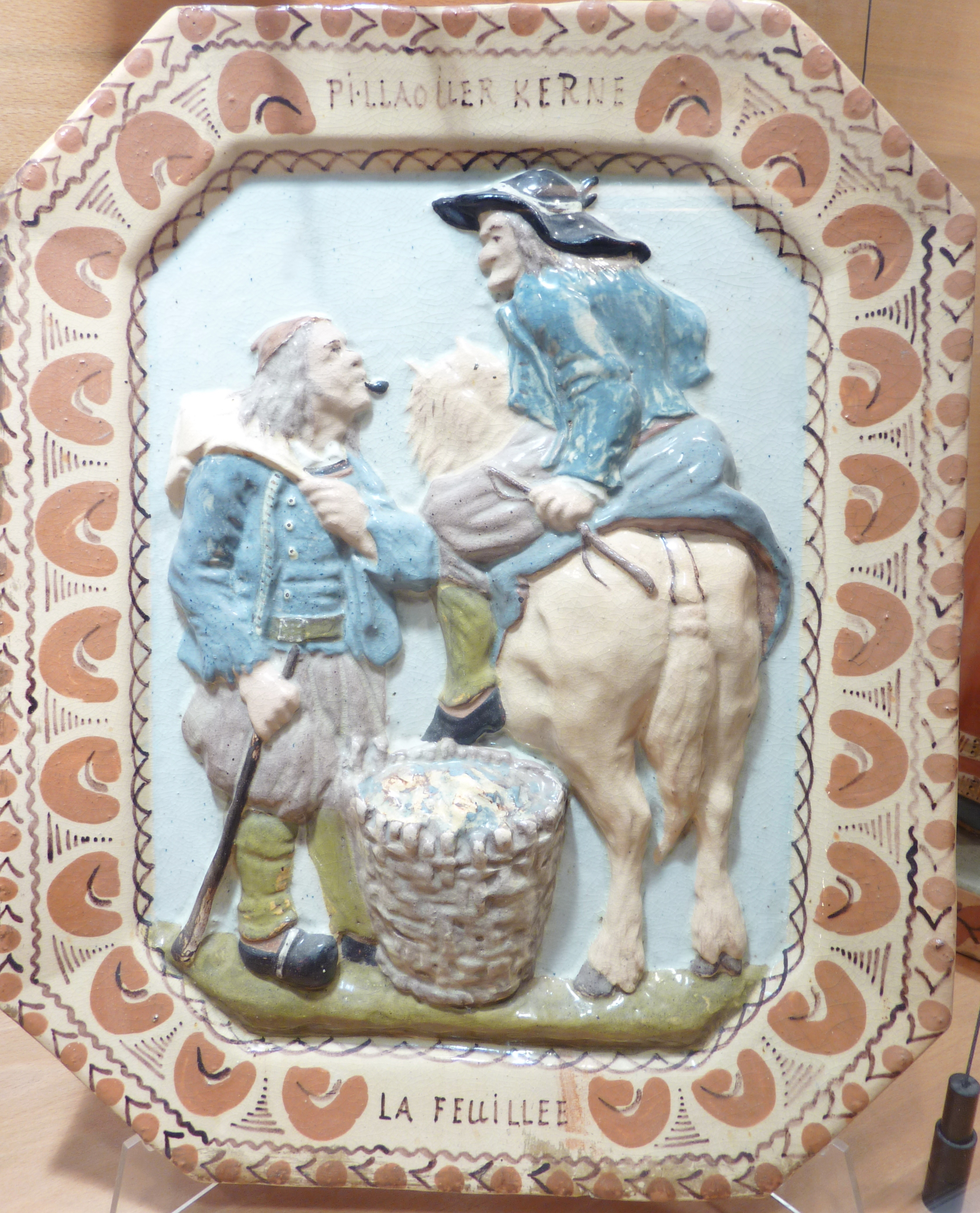 Faïence de Quimper : pilhaouer (chiffonnier) de La Feuillée (Finistère) vers 1920, musée de la faïence de Quimper